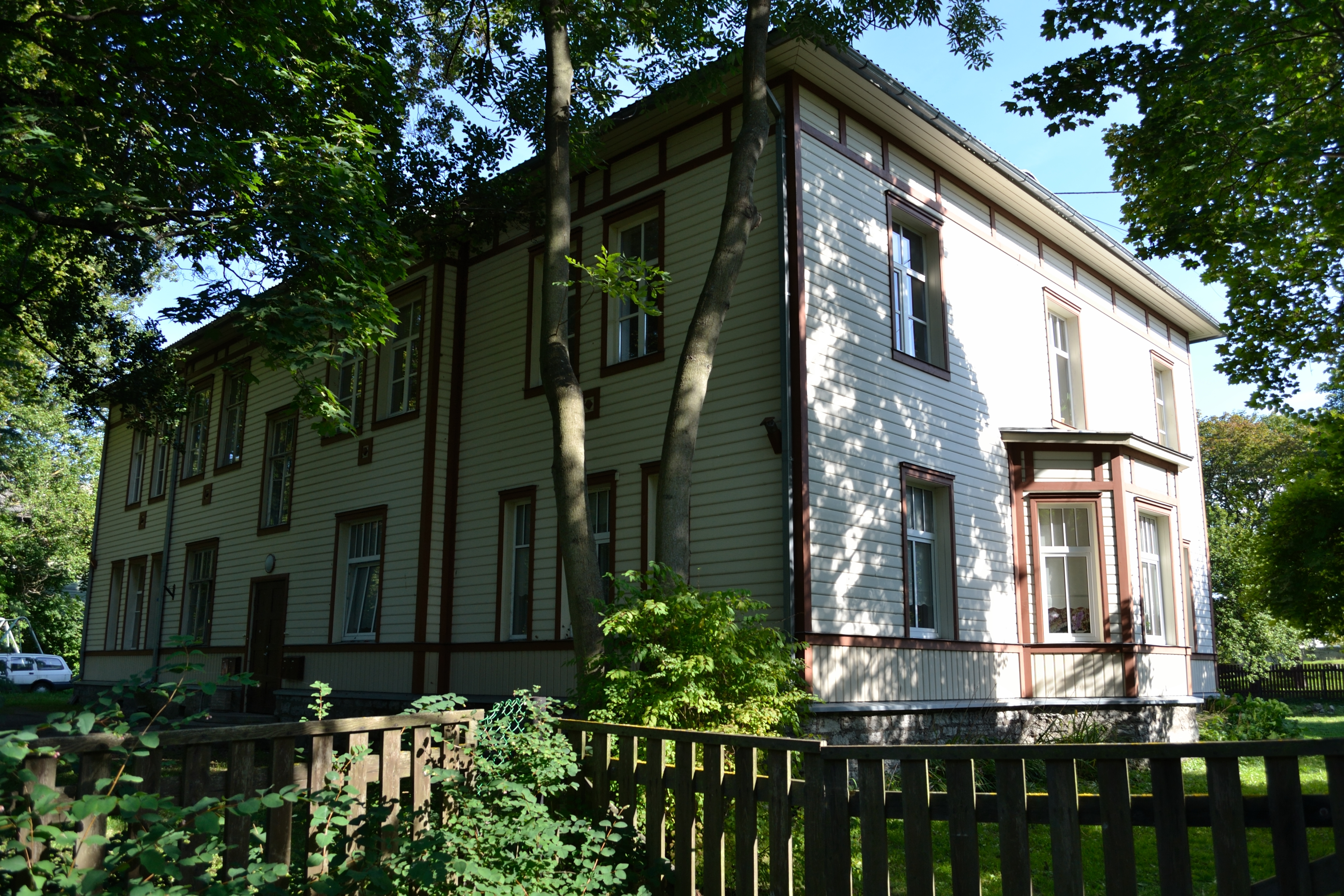 Tallinn, Vene-Balti laevatehase nooremteenistujate elamu Süsta tn 7, 1914